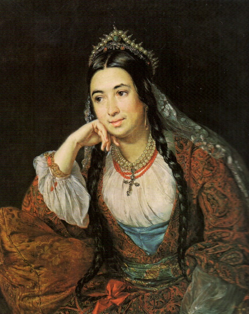 Тропинин Василий Андреевич. Портрет писательницы ВИ.Лизогуб. 1847г.